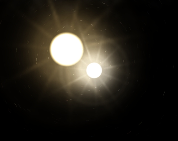 Eta Andromedae A, and Eta Andromedae B.